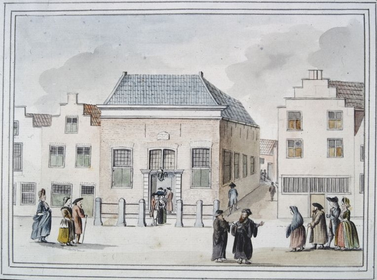 De synagoge in Leiden getekend door Jacob Timmermans. 1787